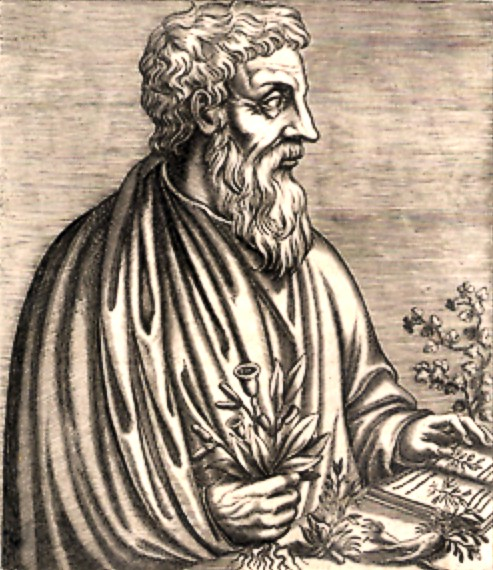 Pedanius Dioscorides (c40-c90AD)